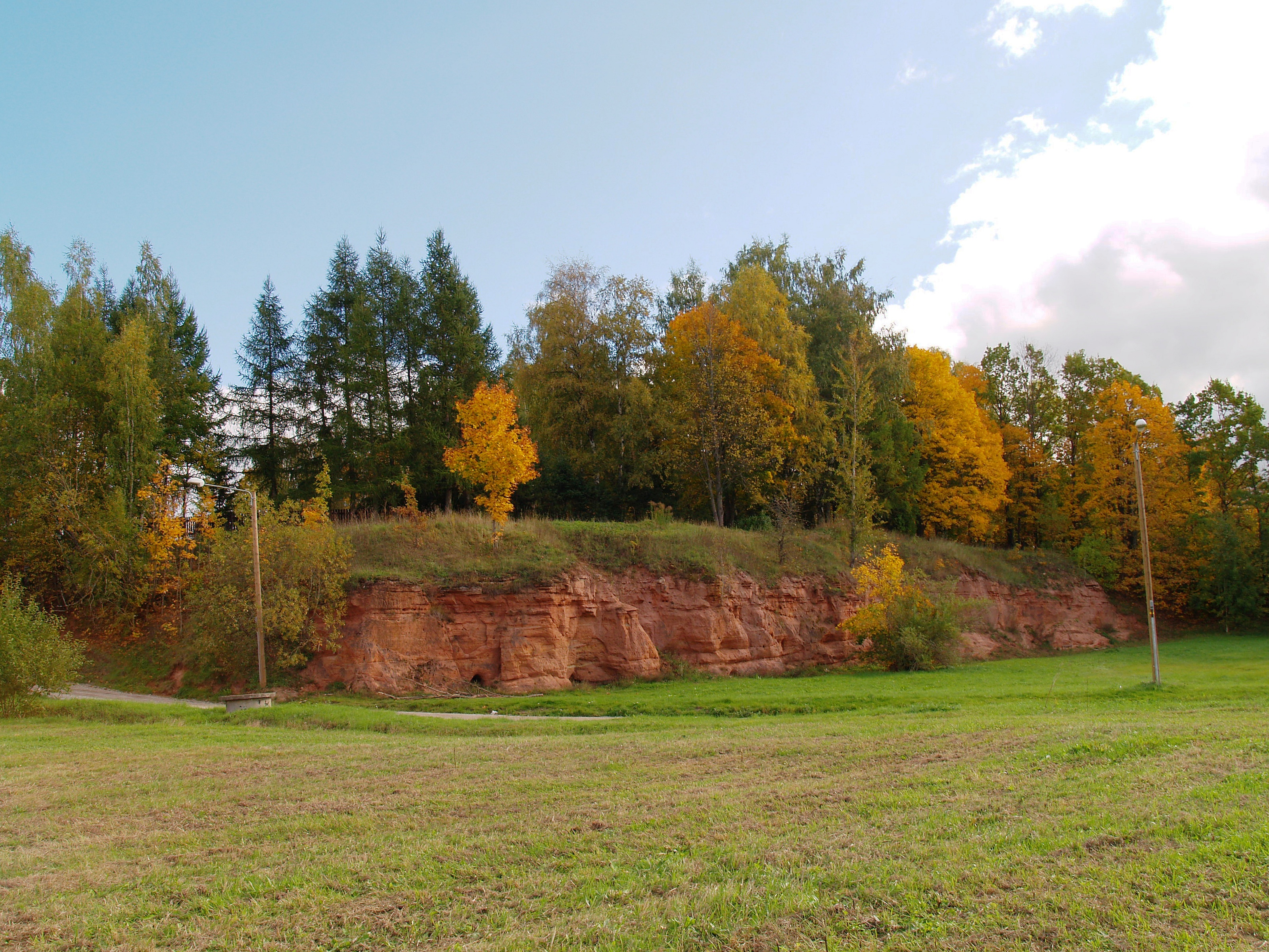 Kalmistu paljand; (Tartu devoni paljand)